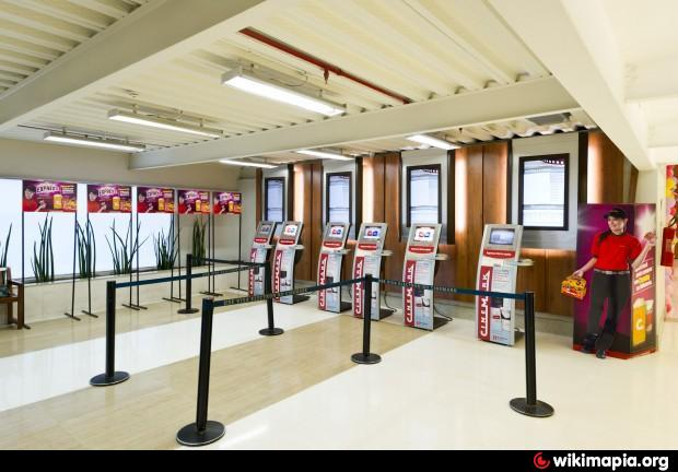 Totens de auto atendimento do Cinemark Taguatinga, DF